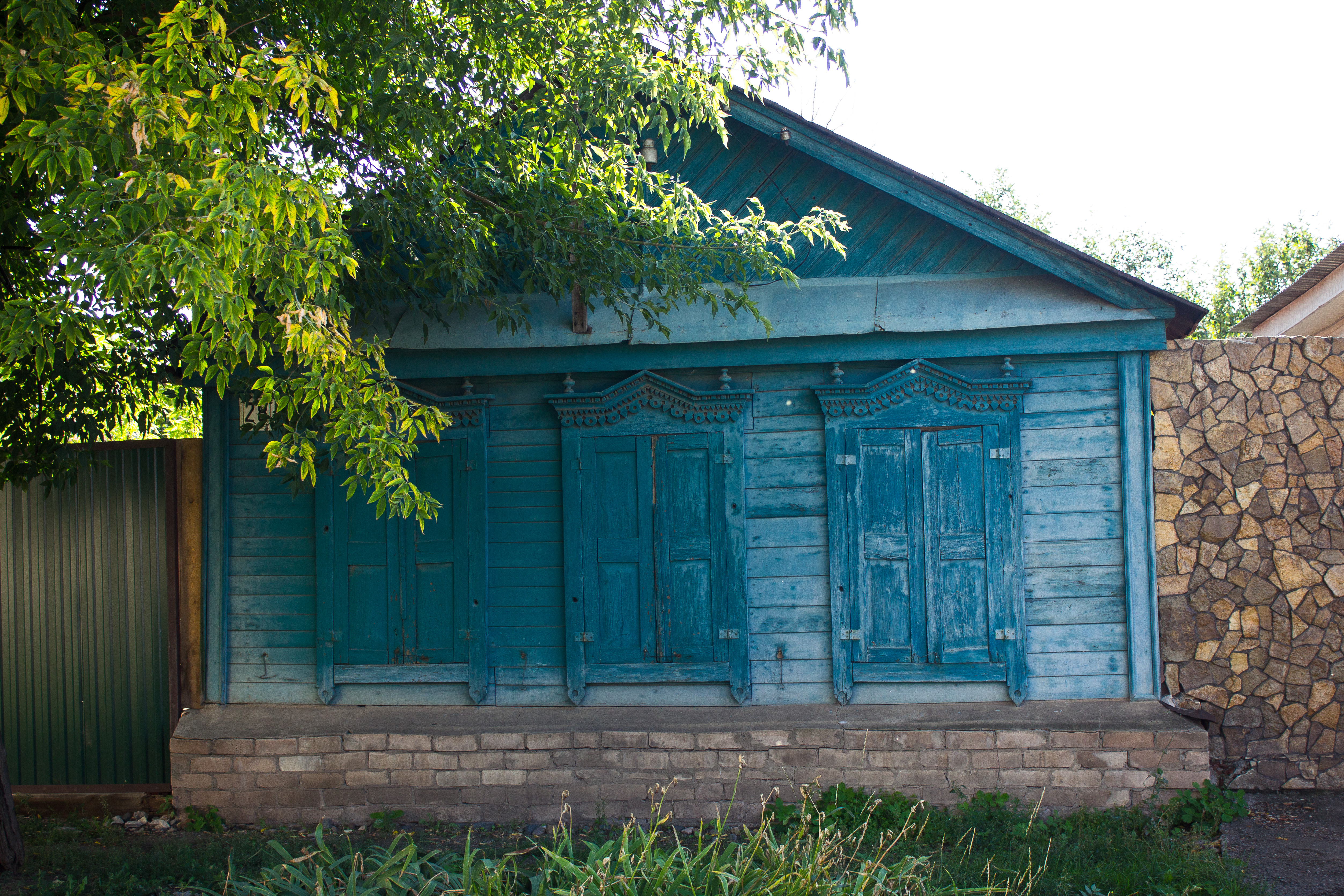 Дом, в котором в апреле 1919 г. жил Д.А.Фурманов: улица Чапаева, 28, Оренбург, Оренбургская область